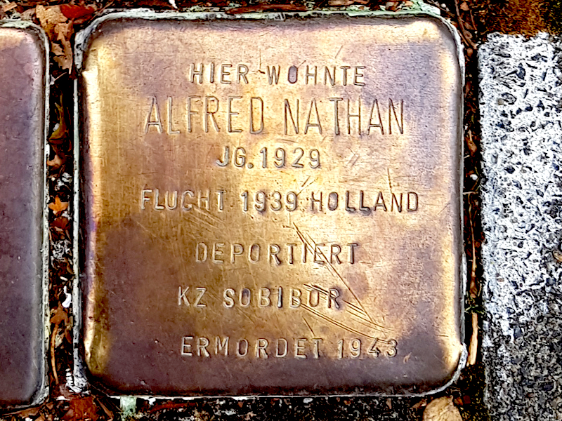 Stolperstein für Alfred Nathan, Lerchenstr. 25, Duisburg-Neudorf